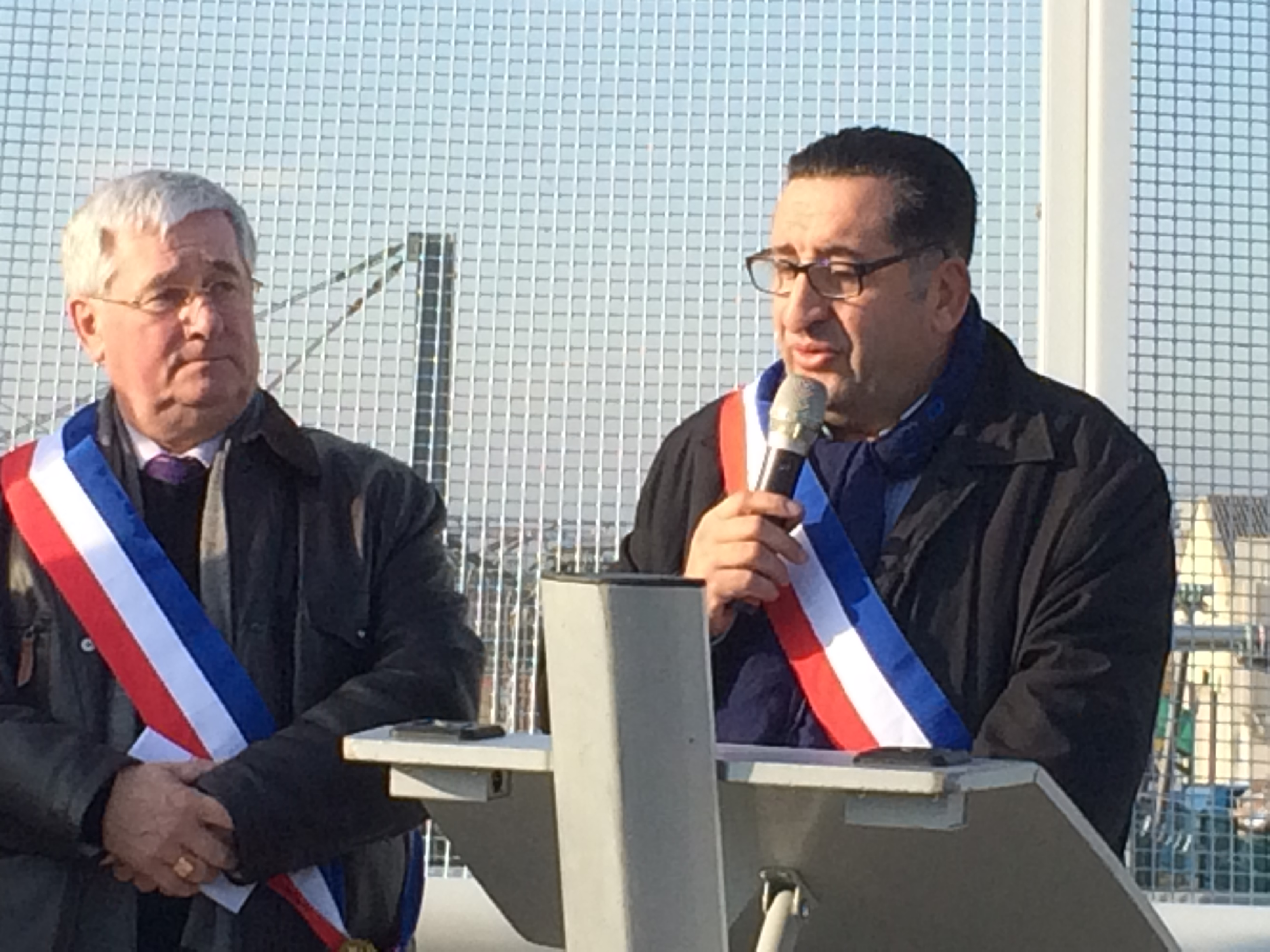 Le maire de Pierrefitte Michel Fourcade et le maire de Stains Azzedine Taïbi lors de l'inauguration du pont Frida Kahlo